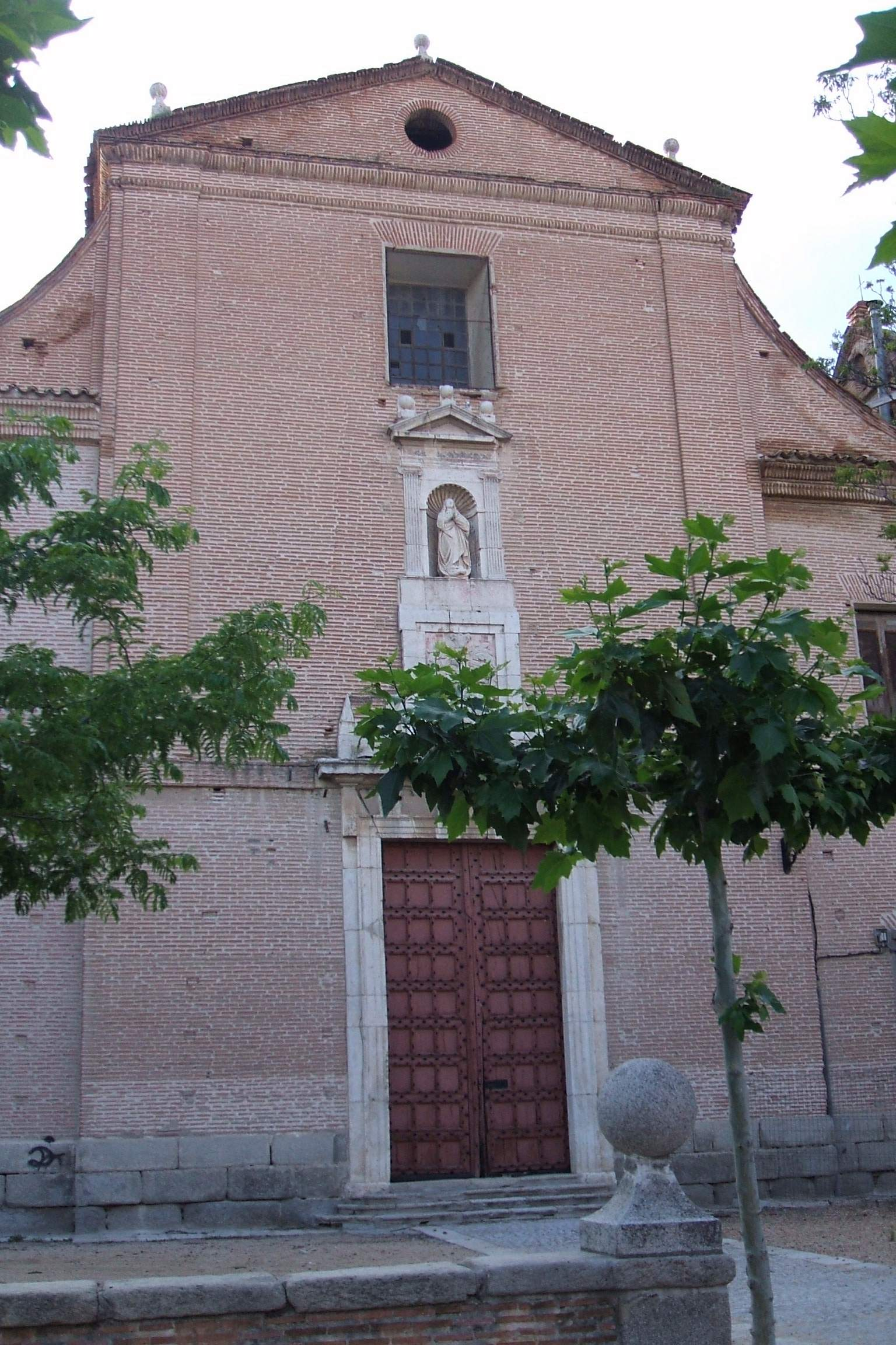 Hospital de la Purísima Concepción y San Diego de Alcalá, o de Simón Ruiz (Medina del Campo)